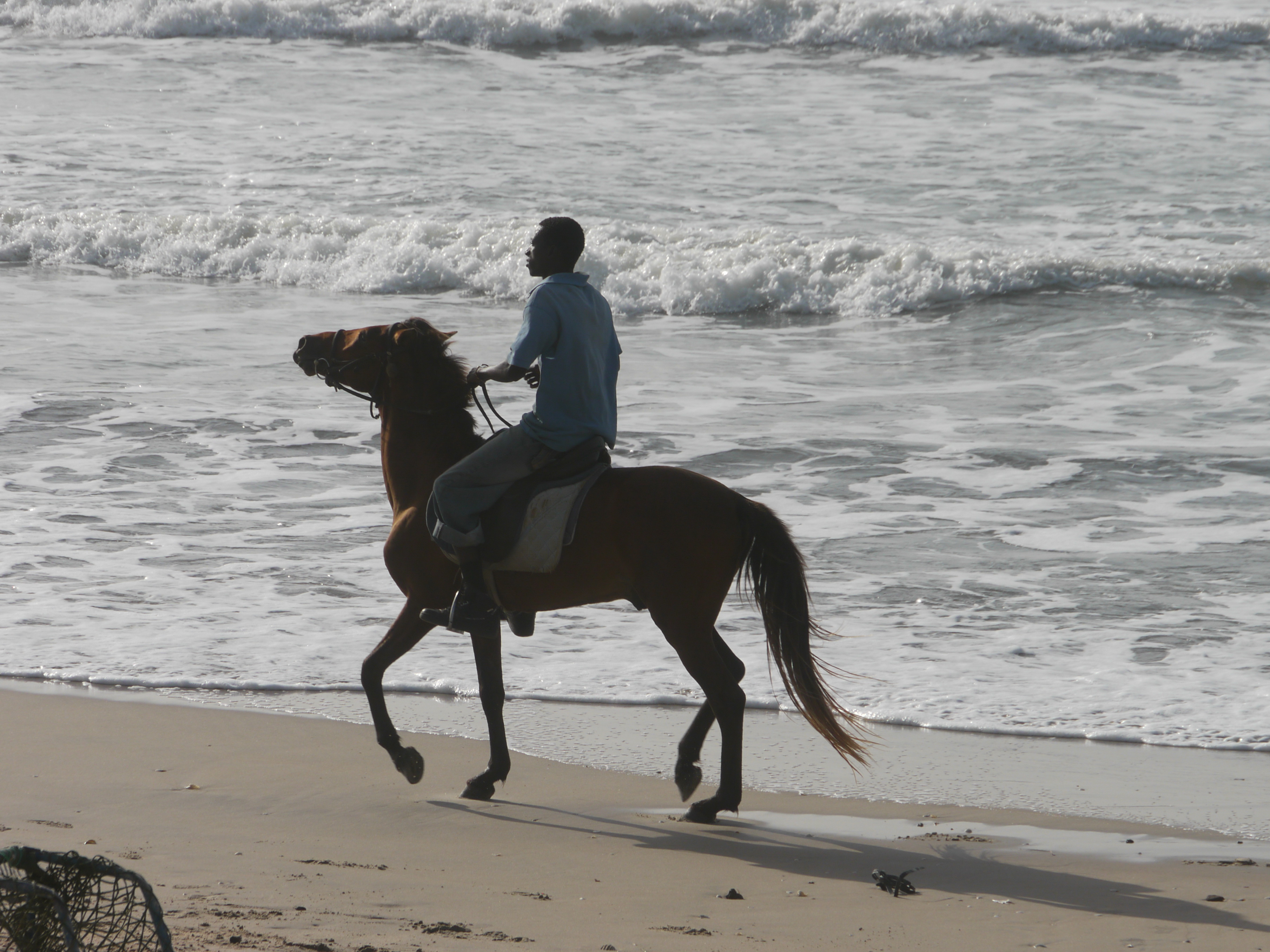 GambiaKoliliBeach137